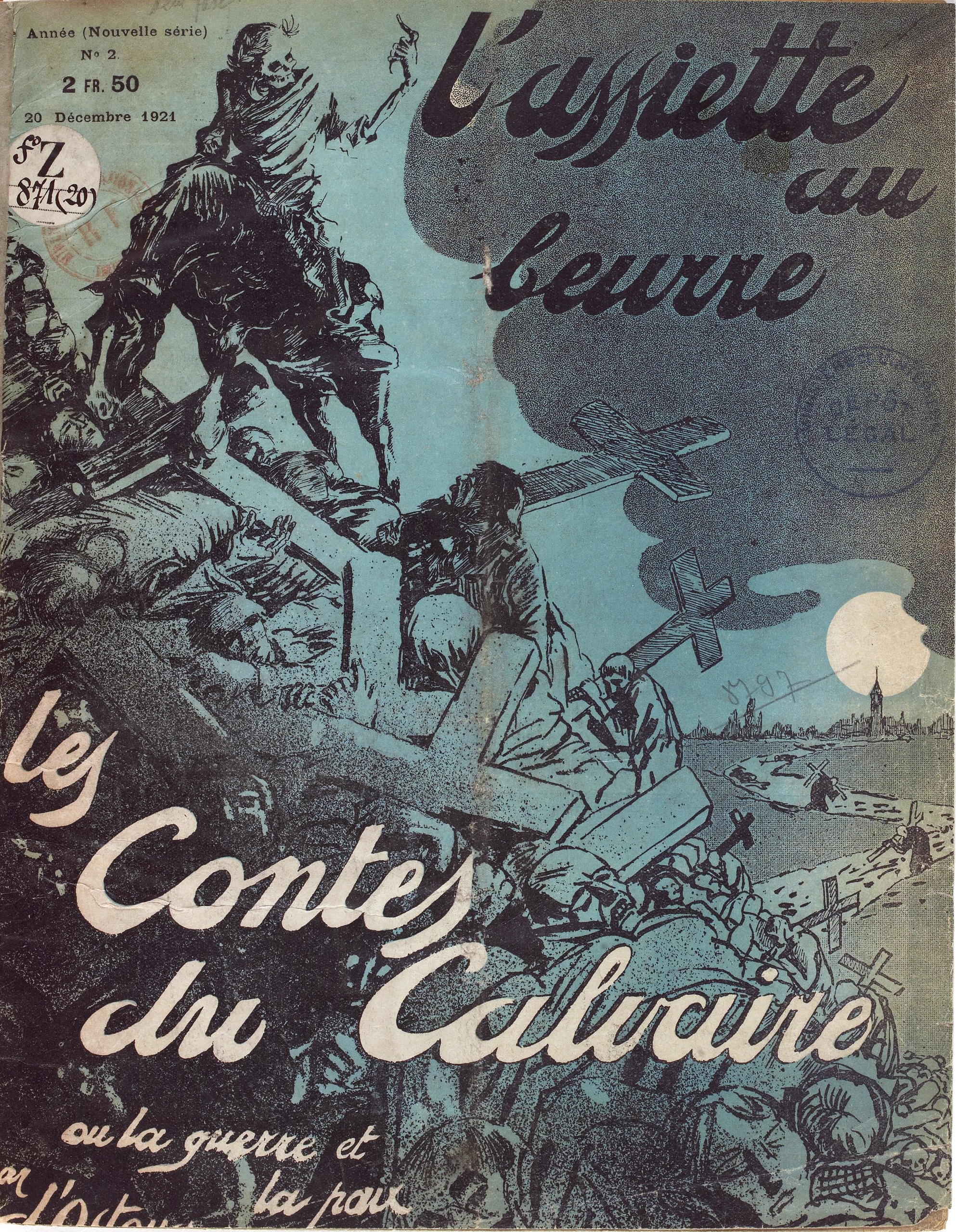 Cover